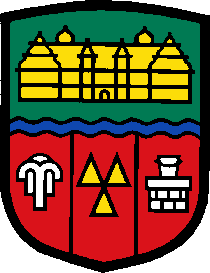 Der Samtgemeinderat der zum 1. Januar 1973 neugebildeten Samtgemeinde Bevern hat die Annahme des vorstehend beschriebenen Wappens beschlossen, das der Innenminister von Niedersachsen genehmigte. Flaggenbeschreibung „Die Flagge der Samtgemeinde weist die Farben grün-rot aus und zeigt das Wappen der Samtgemeinde.“